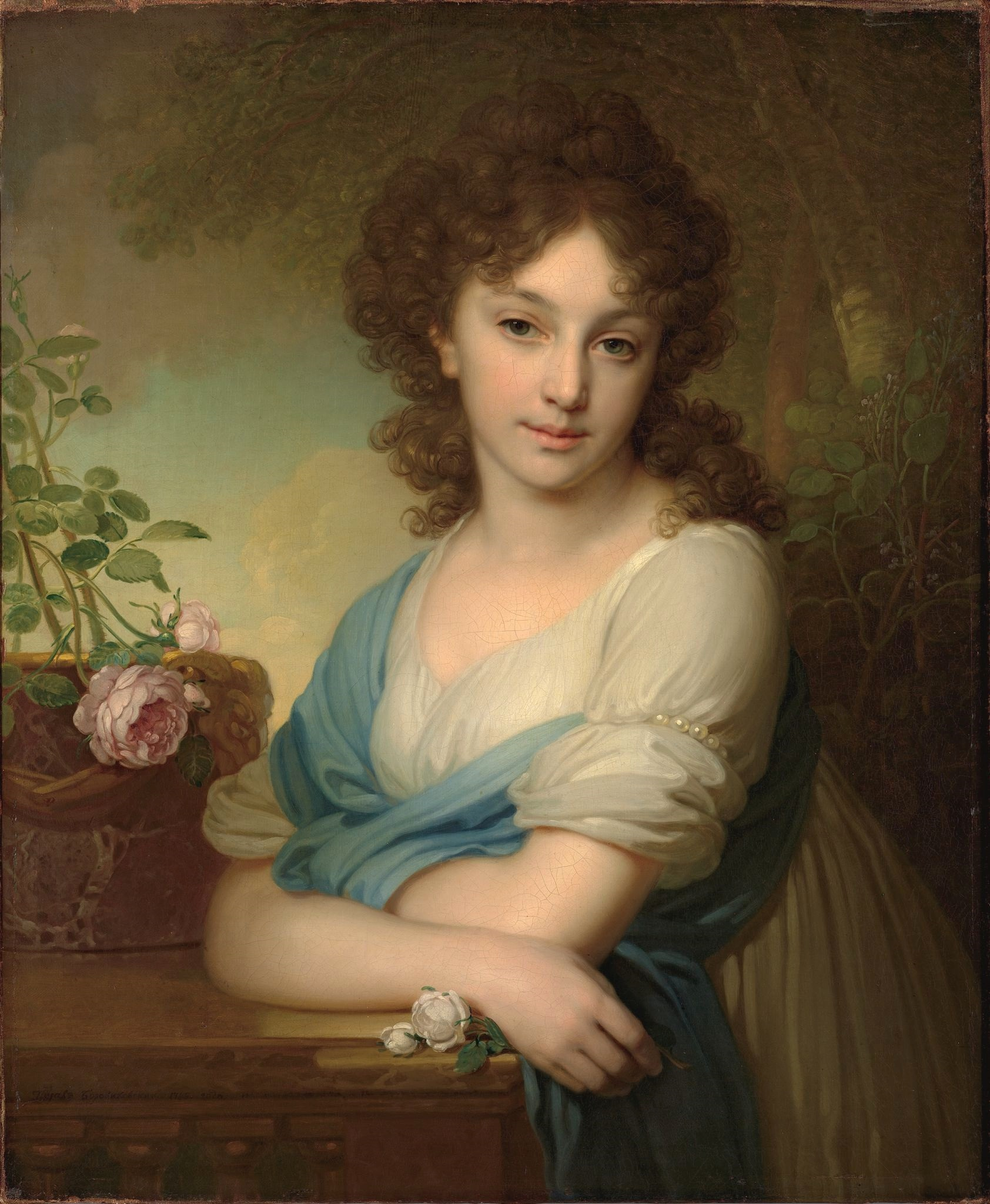 Елена Александровна Нарышкина, в замужестве Суворова, жена Аркадия Суворова, сына знаменитого генералиссимуса